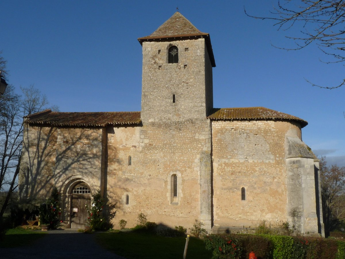 église de Bourg-du-Bost, Dordogne, France